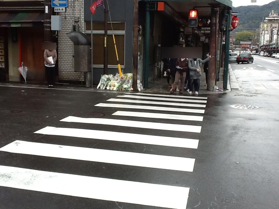 京都市祇園暴走事故の現場-1 事故の2日後の朝。 写真右手側から左手側へ暴走車は通過した。 画面中央左は大和大路交番。